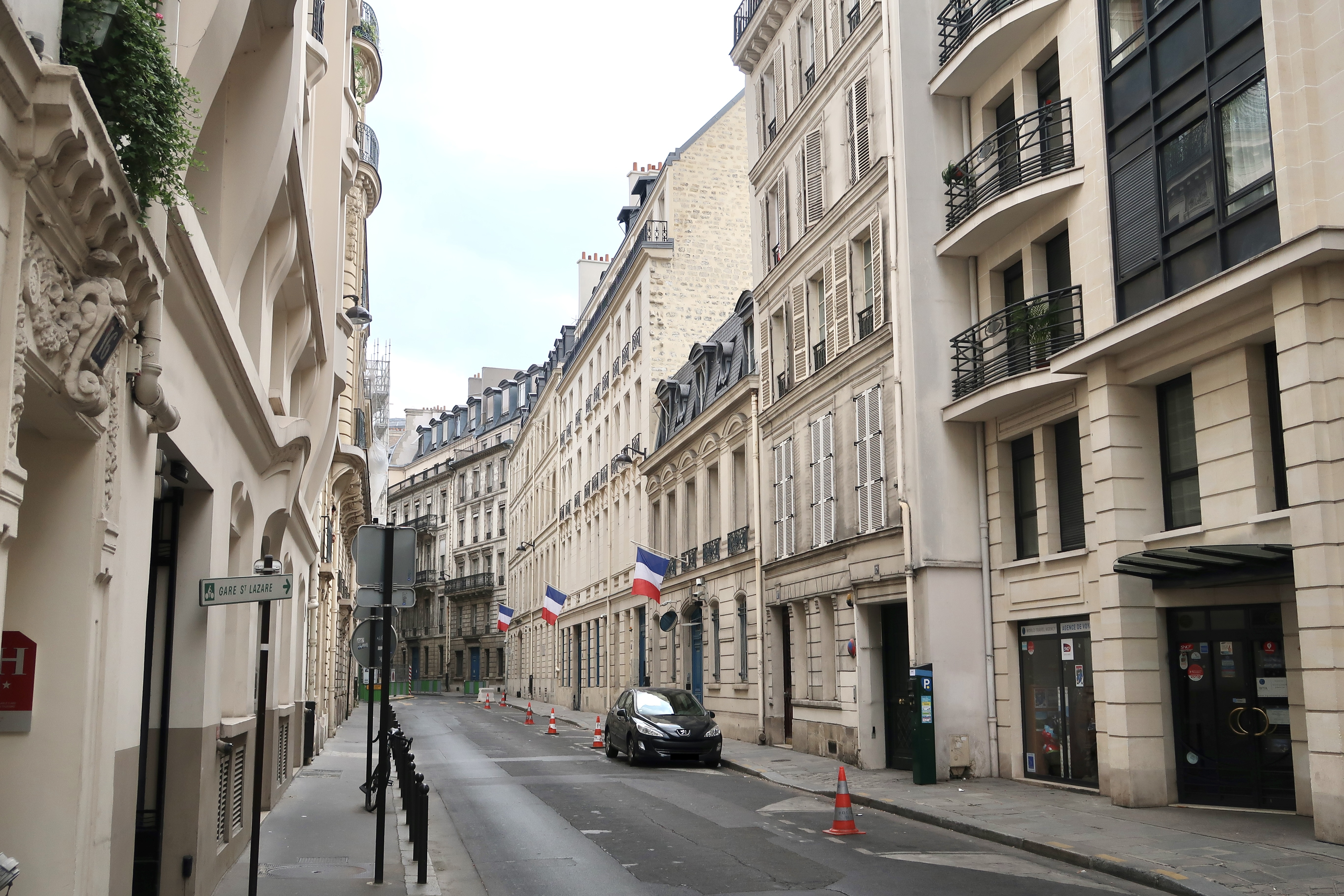 Rue Cambacérès (Paris, 8e).